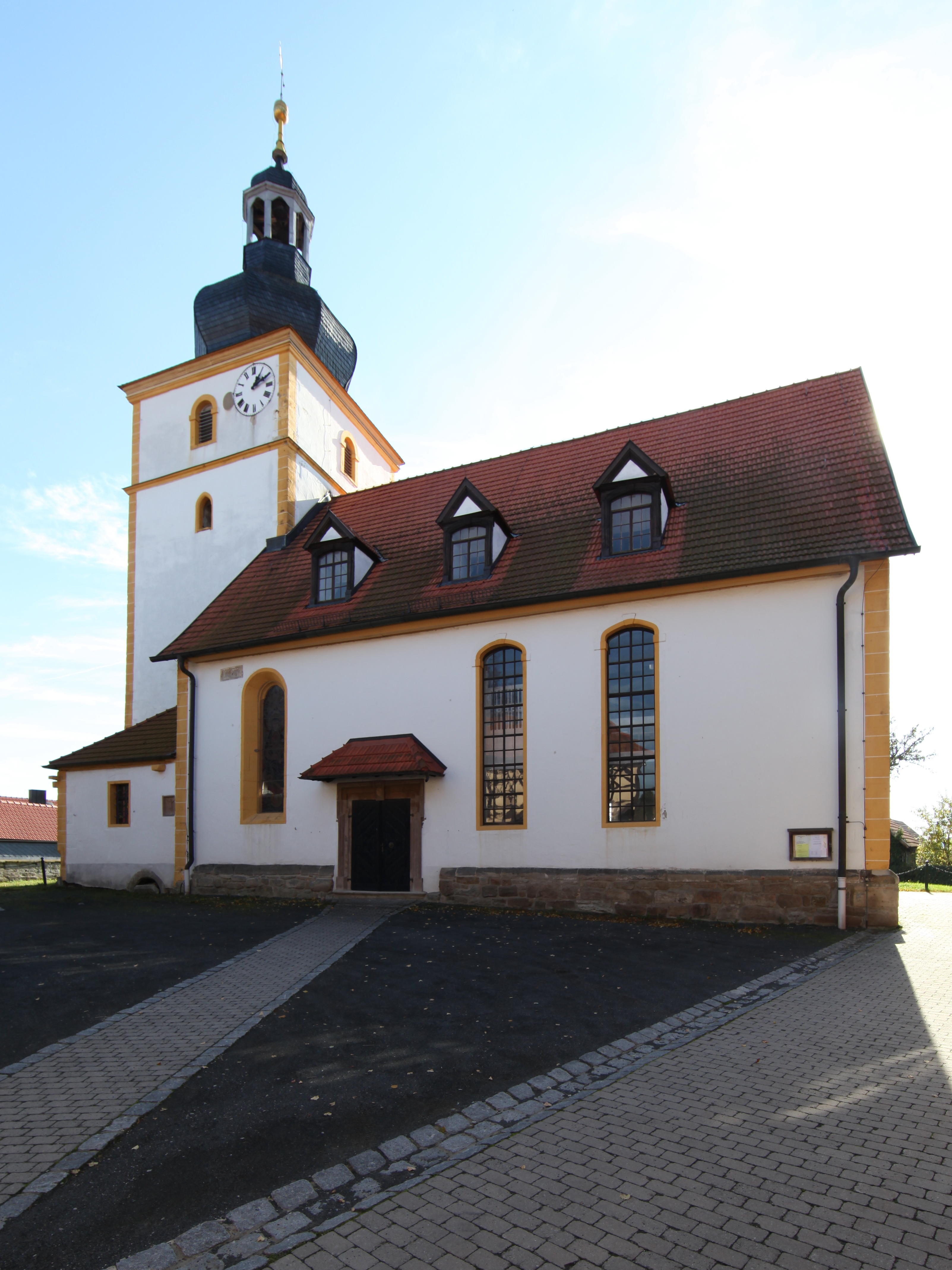 Gompertshausen-Ev-Kirche-01